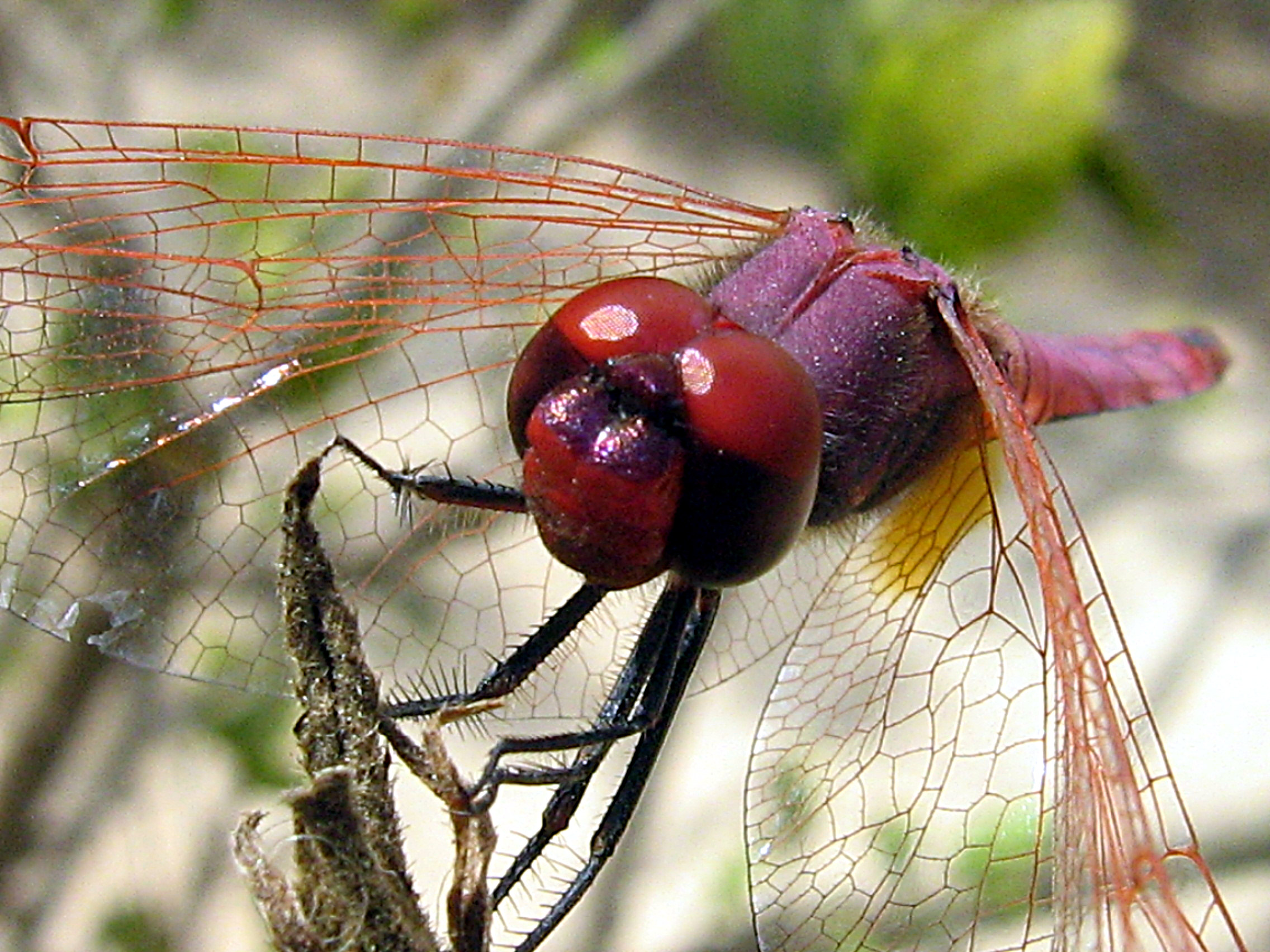 Стрекозы в Ливии такие же, как и на Украине.